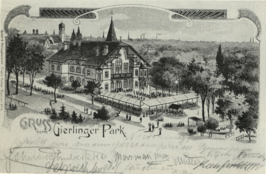 Der Gierlinger Park war ein Vergnügungsbetrieb in München-Thalkirchen zwischen 1900 und 1904. Er bot neben einem Restaurant mit Wirtsgarten und Café auch eine Almhütte, einen See mit Bootsverleih und mehrere weitere Attraktionen.